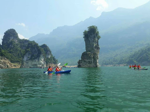 Danh thắng Cột Buộc Trâu chống Trời